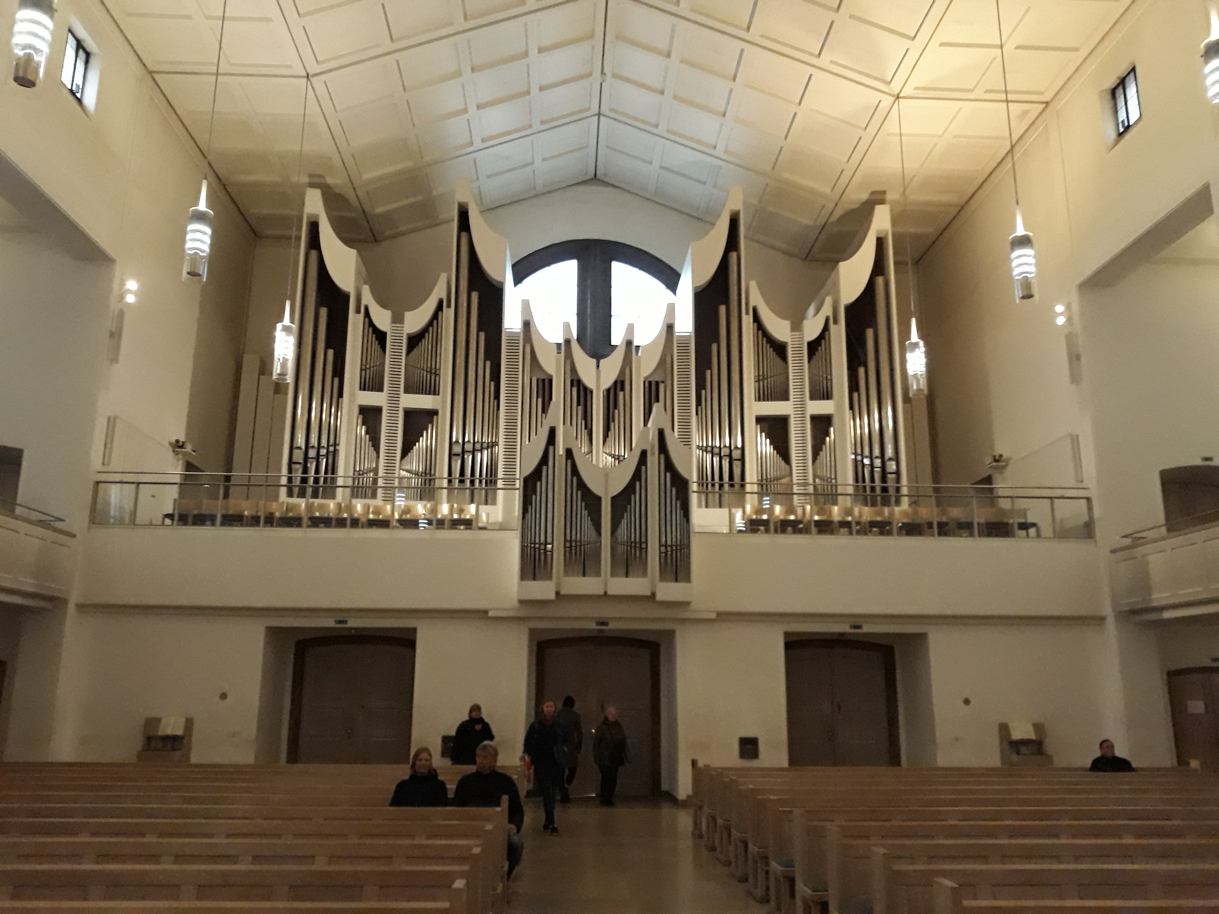 Blick auf die Orgel in der Domkirche St. Eberhard (Stuttgart). Erbauer Winfried Albiez aus Lindau. Siehe [1]